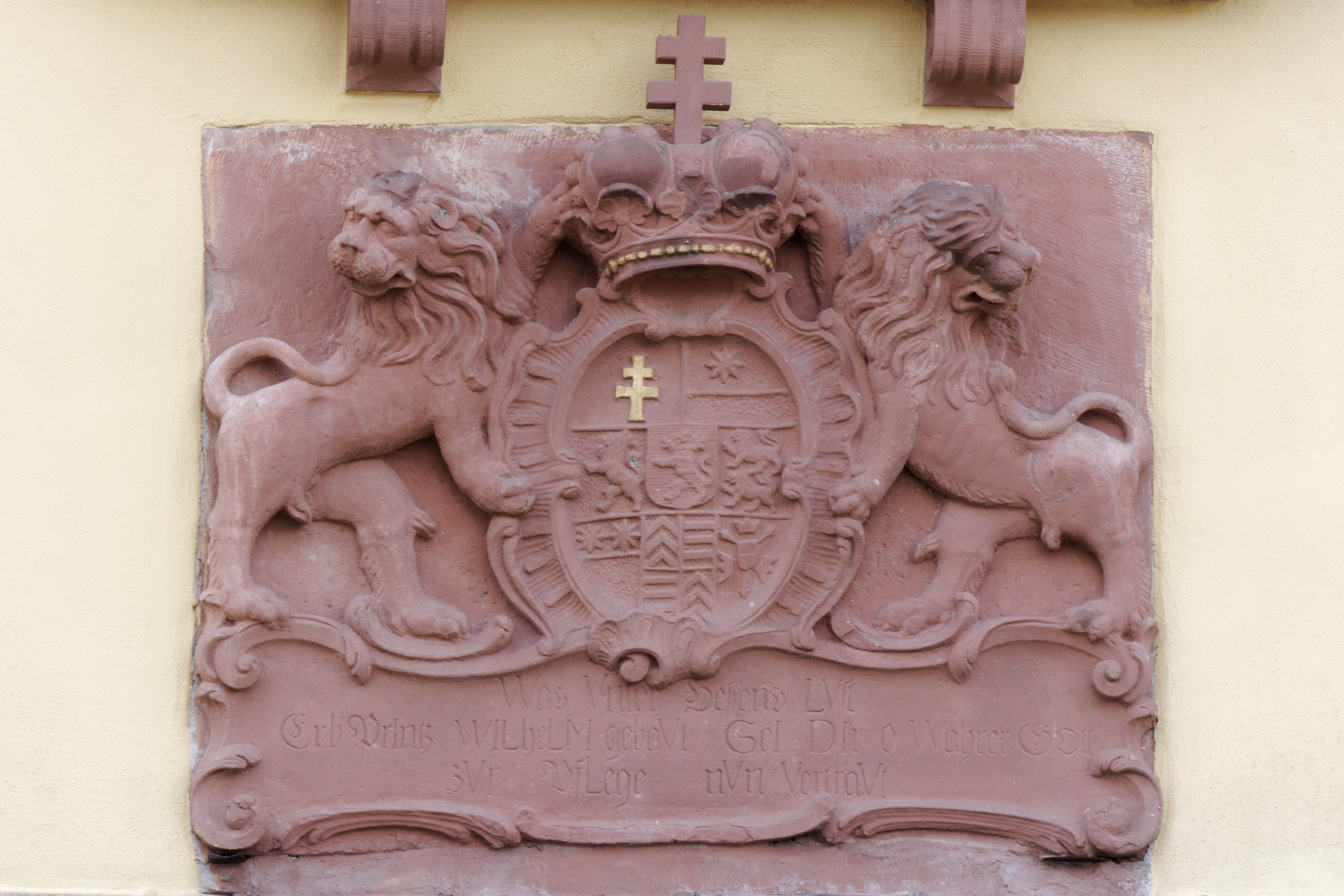 Wappen der Landgrafen von Hessen-Kassel über dem Hauptportal der evangelischen Kirche in Dudenhofen, einem Stadtteil von Rodgau (Hessen).